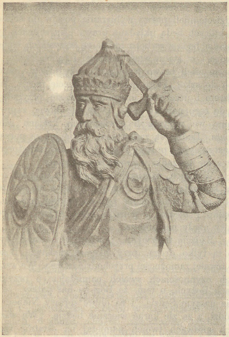 Беларуская (тарашкевіца): Партрэт караля Міндоўга